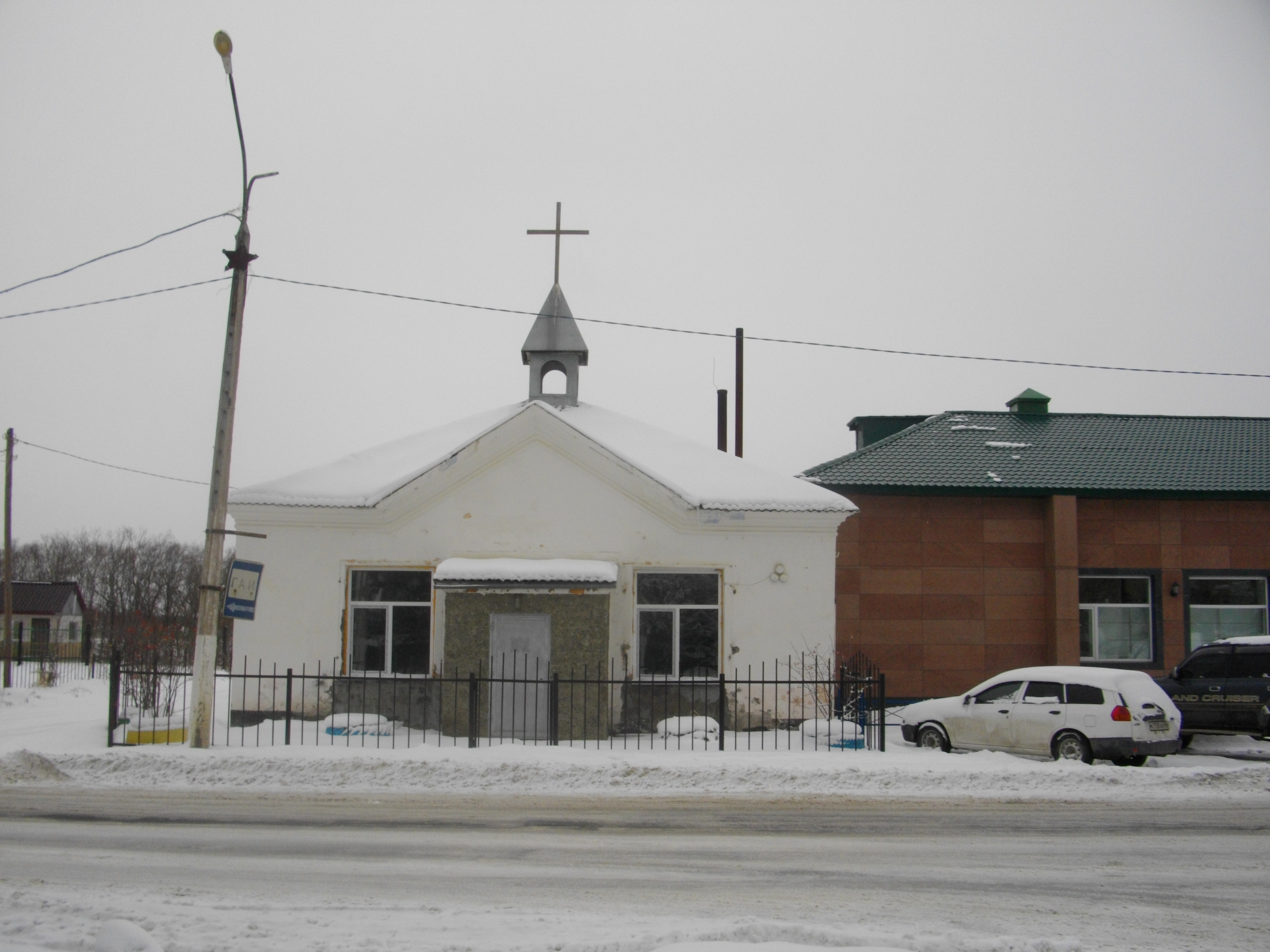 Церковь в городе Анива, Сахалинская область